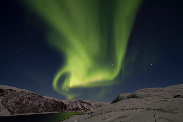 Nordlys i Skillefjorden